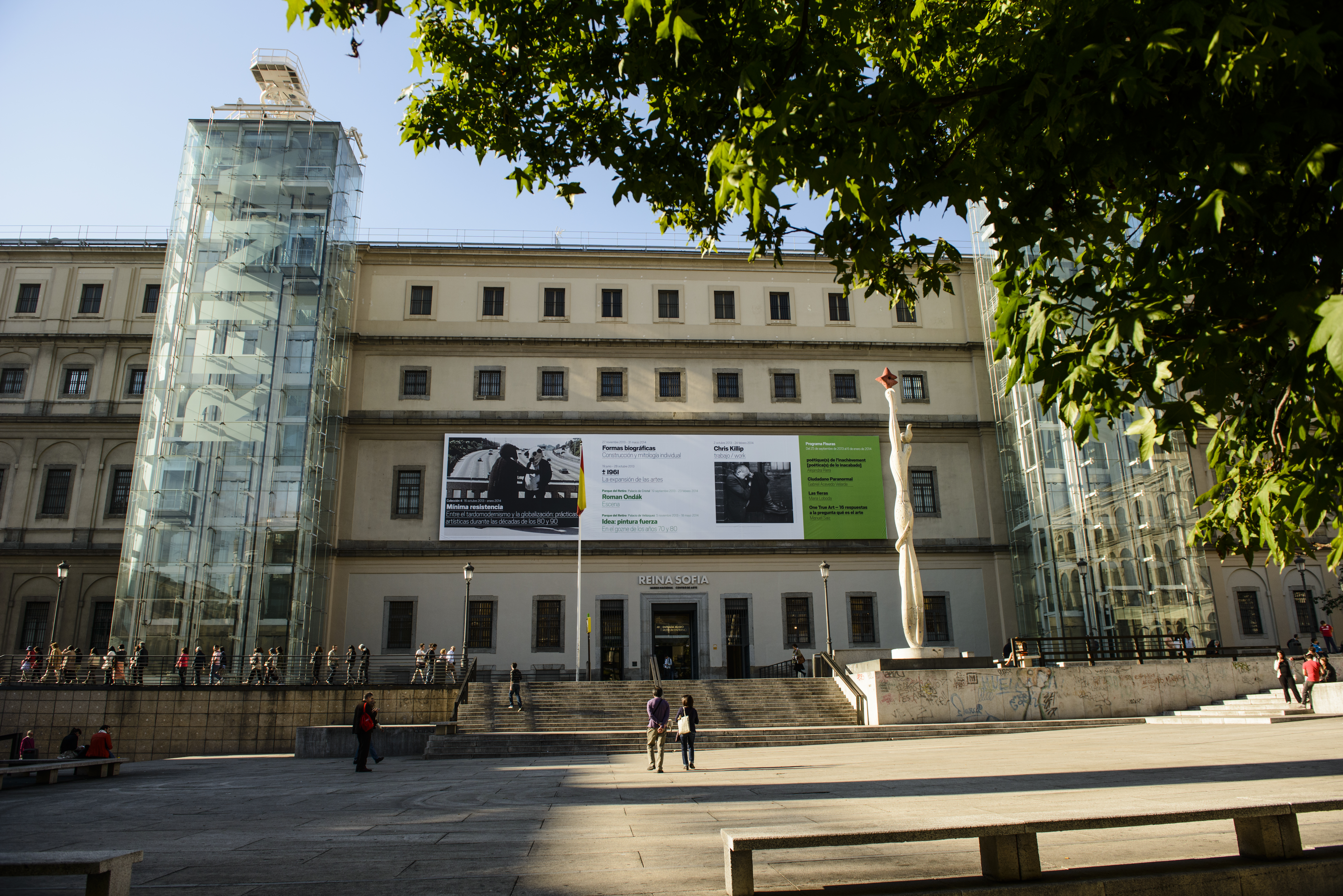 Madrid, Spain.